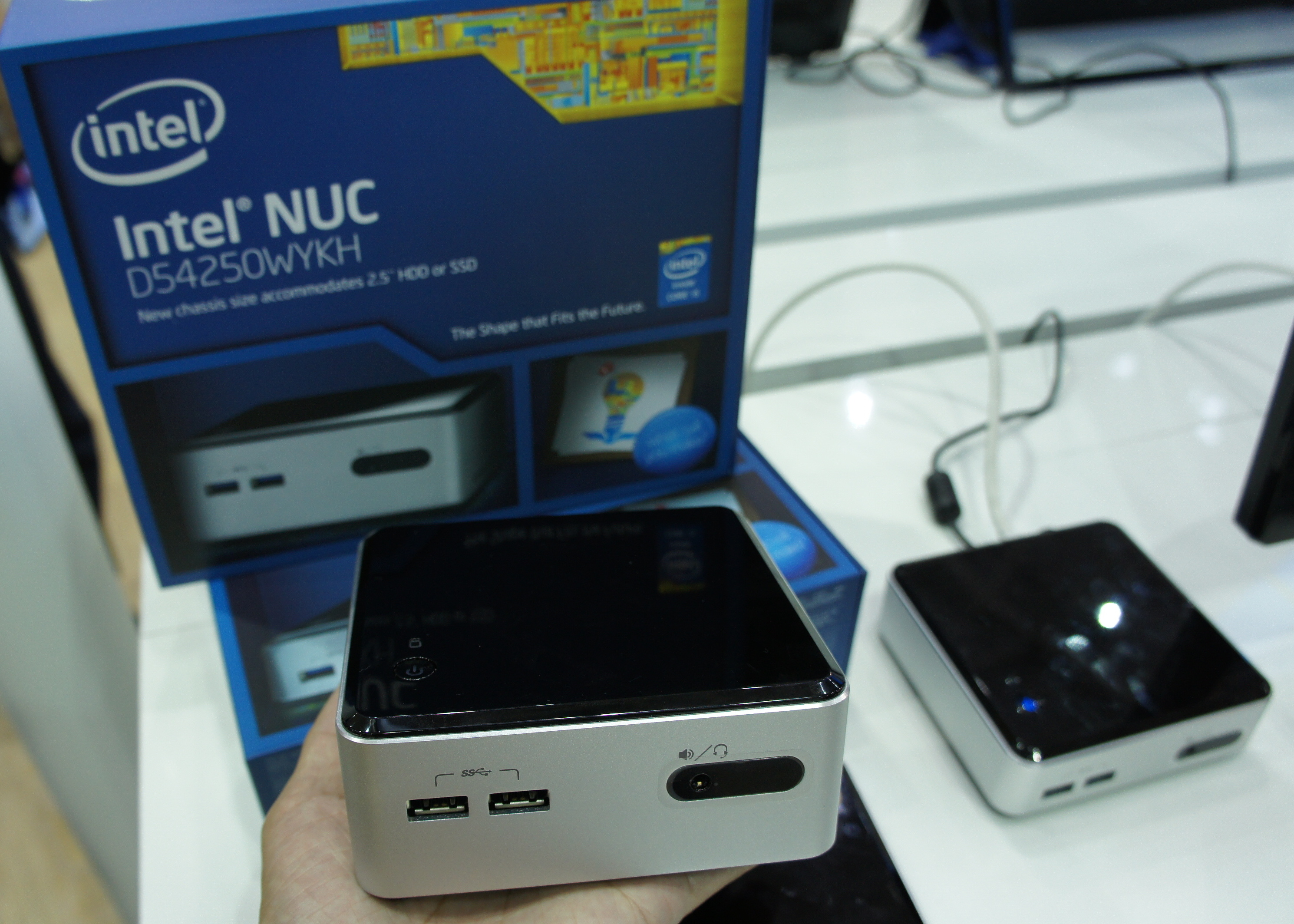 2014台北國際電腦展展示品：英特爾NUC D54250WYKH。